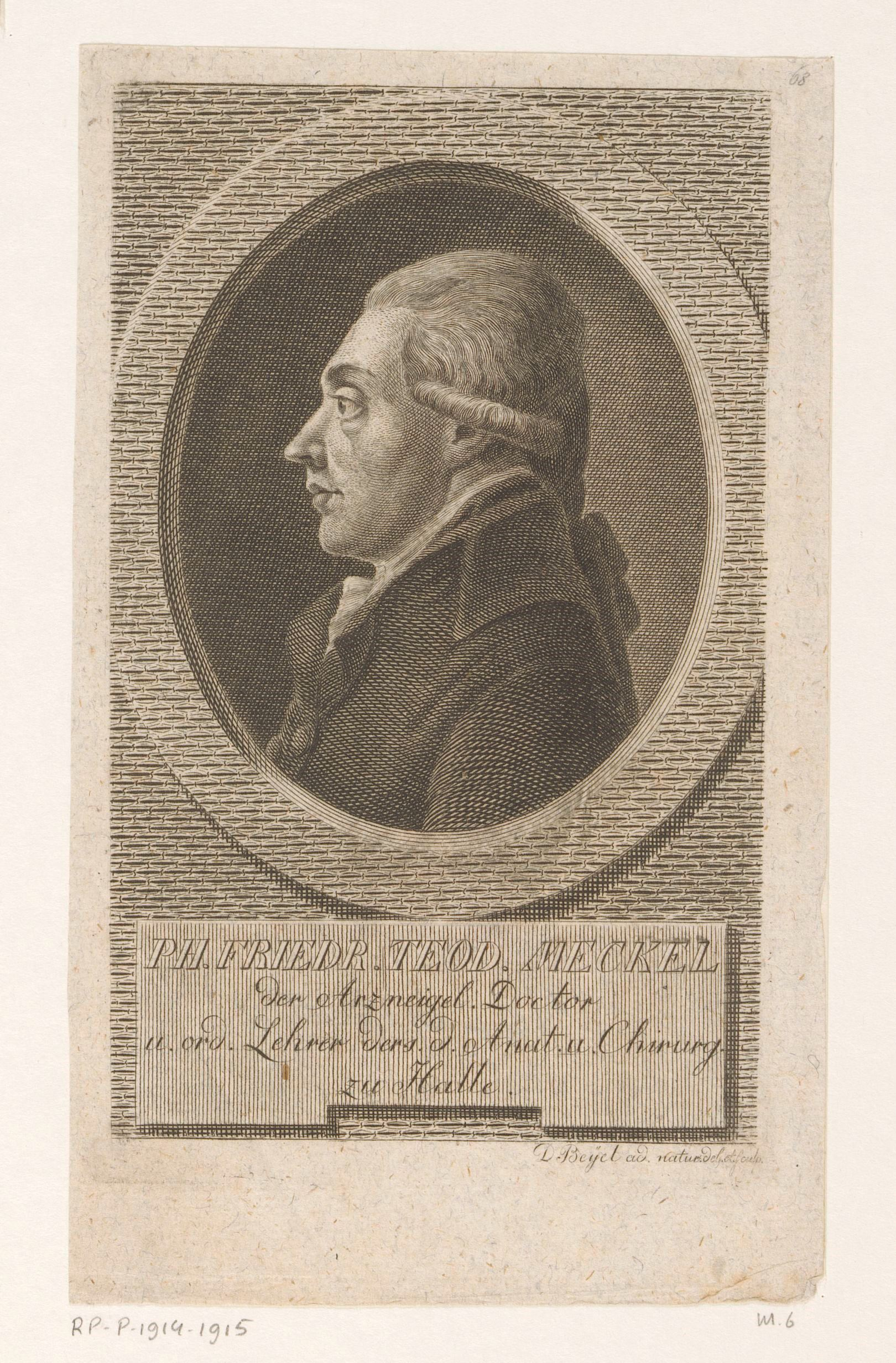 IdentificatieTitel(s): Portret van Philipp Friedrich Theodor MeckelObjecttype: prent Objectnummer: RP-P-1914-1915Catalogusreferentie: HAB A 13758Nagler/Meyer 6Opschriften / Merken: verzamelaarsmerk, verso, gestempeld: Lugt 2228VervaardigingVervaardiger: prentmaker: Daniel Beyel (vermeld op object)naar eigen ontwerp van: Daniel Beyel (vermeld op object)Plaats vervaardiging: Halle an der SaaleDatering: 1796Fysieke kenmerken: gravureMateriaal: papier Techniek: graveren (drukprocedé)Afmetingen: blad: h 180 mm (binnen de plaatrand afgesneden) × b 108 mm (binnen de plaatrand afgesneden)ToelichtingPrent ook gebruikt in: Neue Allgemeine deutsche Bibliothek. dl. 21, eerste stuk. Kiel: Carl Ernst Bohn, 1796.OnderwerpWat: historical personsWie: Philipp Friedrich Theodor MeckelVerwerving en rechtenVerwerving: aankoop 1905Copyright: Publiek domein